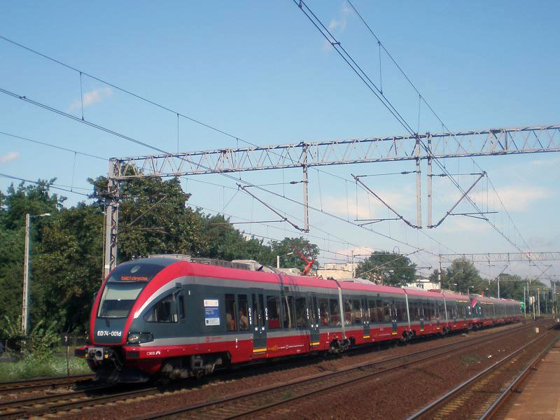 ED74-001+ED74-002, PKP Przewozy Regionalne